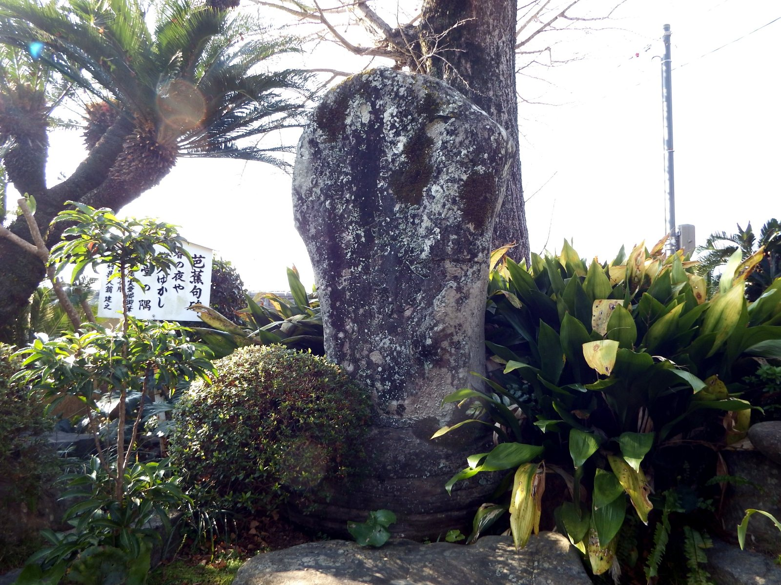 観自在寺の芭蕉碑